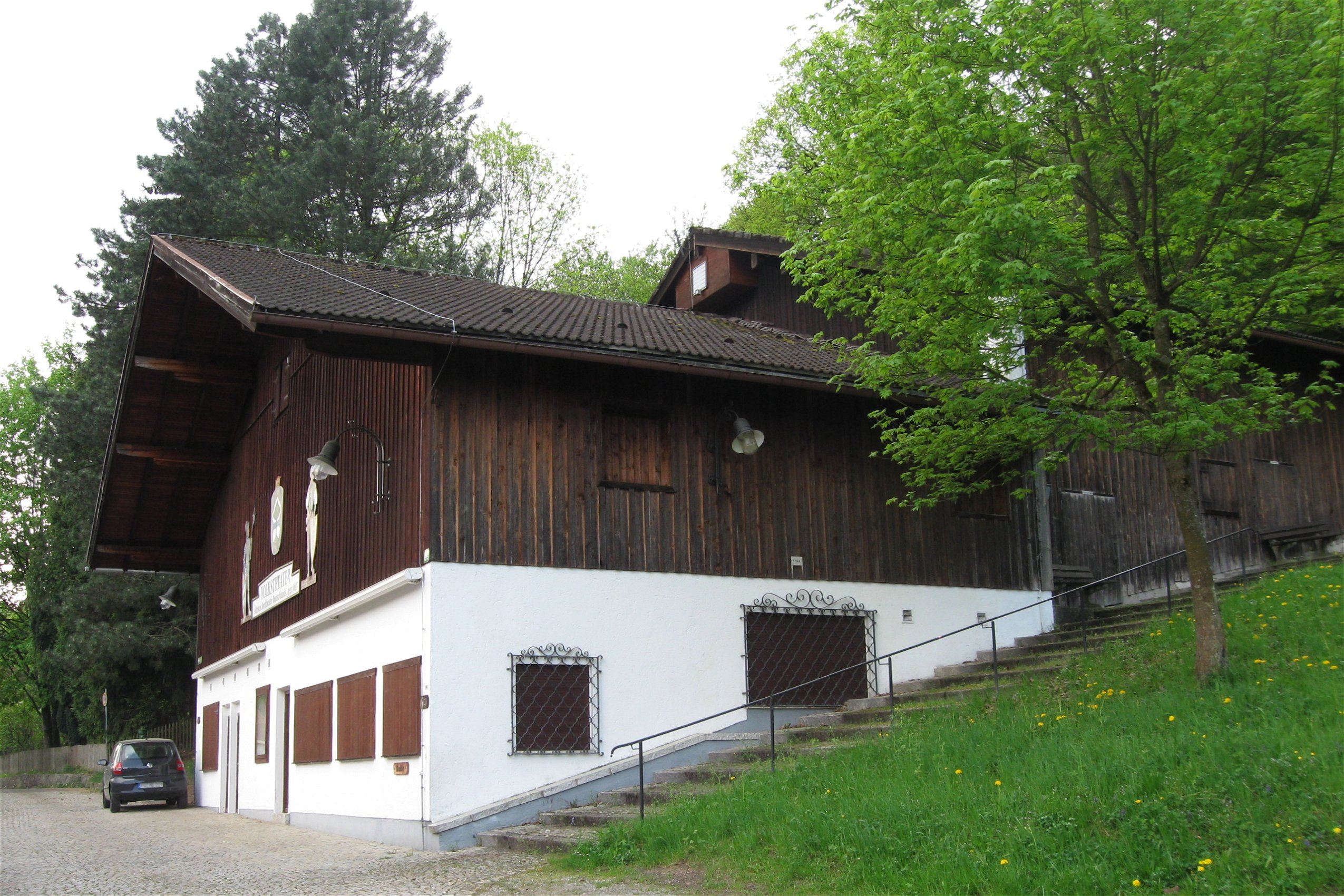 Ritterschauspiele Kiefersfelden, Theaterstadl, Links: Bühnengebäude, rechts oben: Zuschauerraum